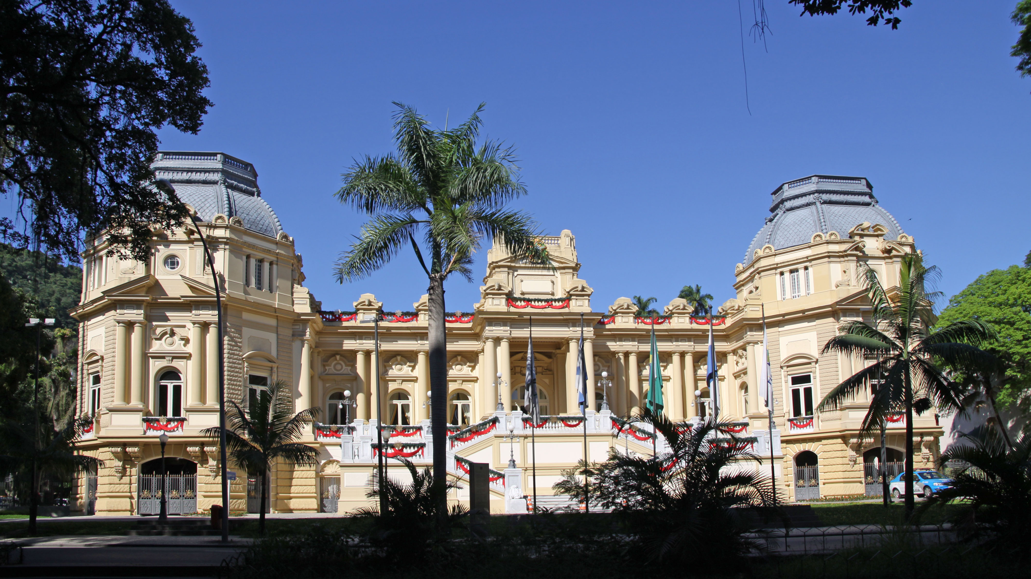 Palácio Guanabara em Laranjeiras decorado para o Natal.